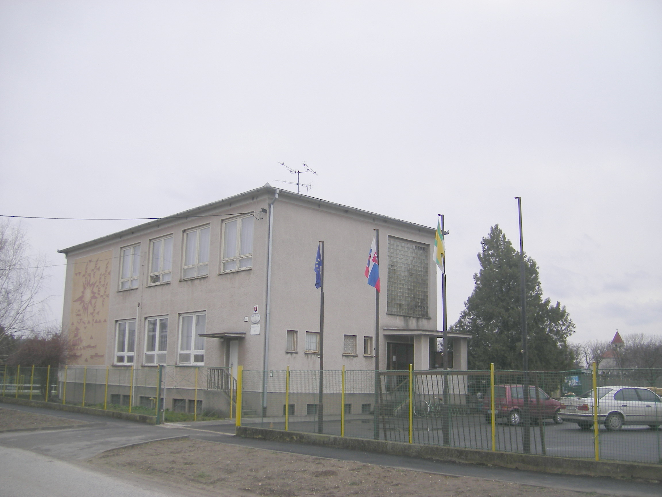 Virt - községháza